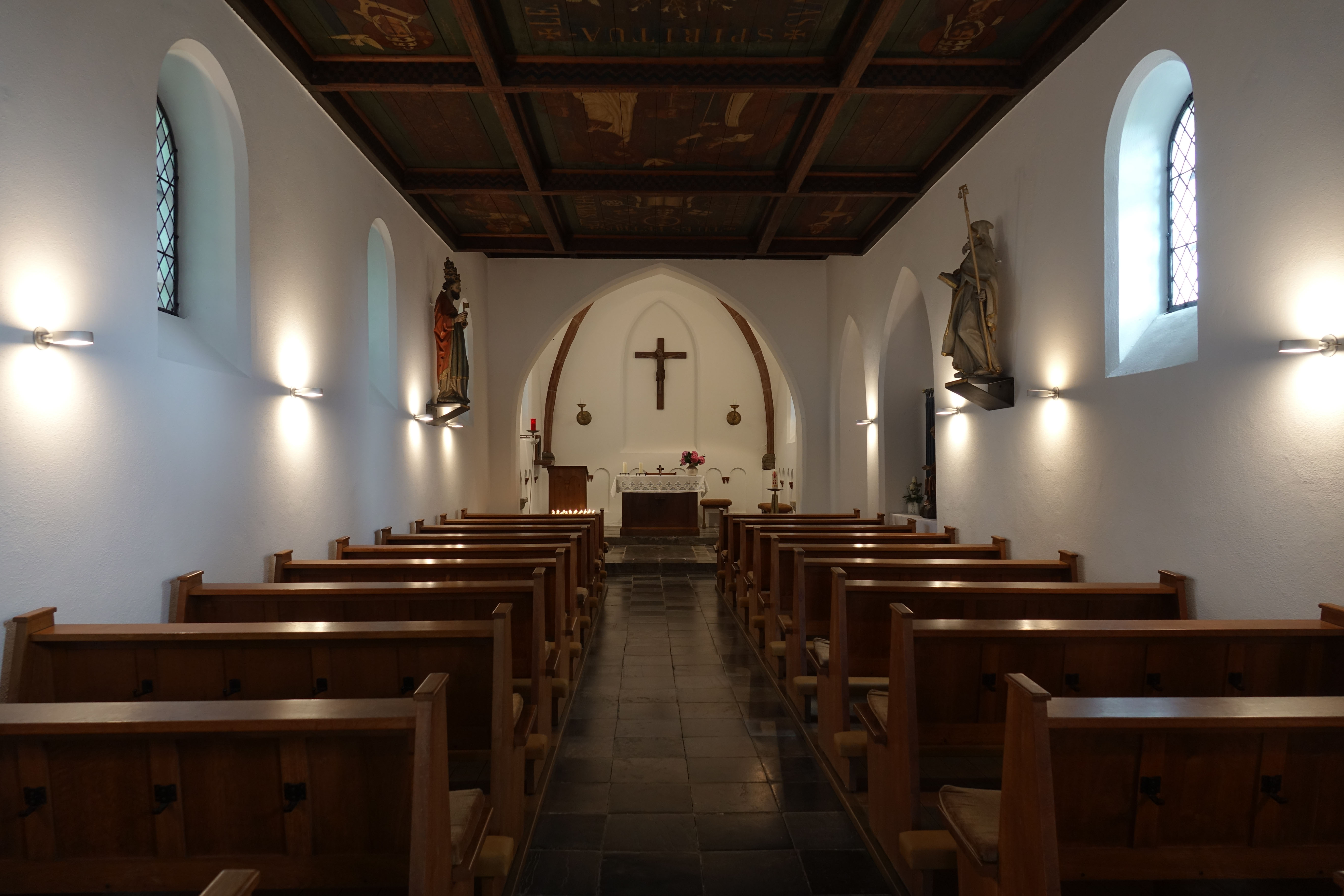 St. Peter (Kempen) - Blick in den Innenraum der KapelleThis is a photograph of an architectural monument., no. 15